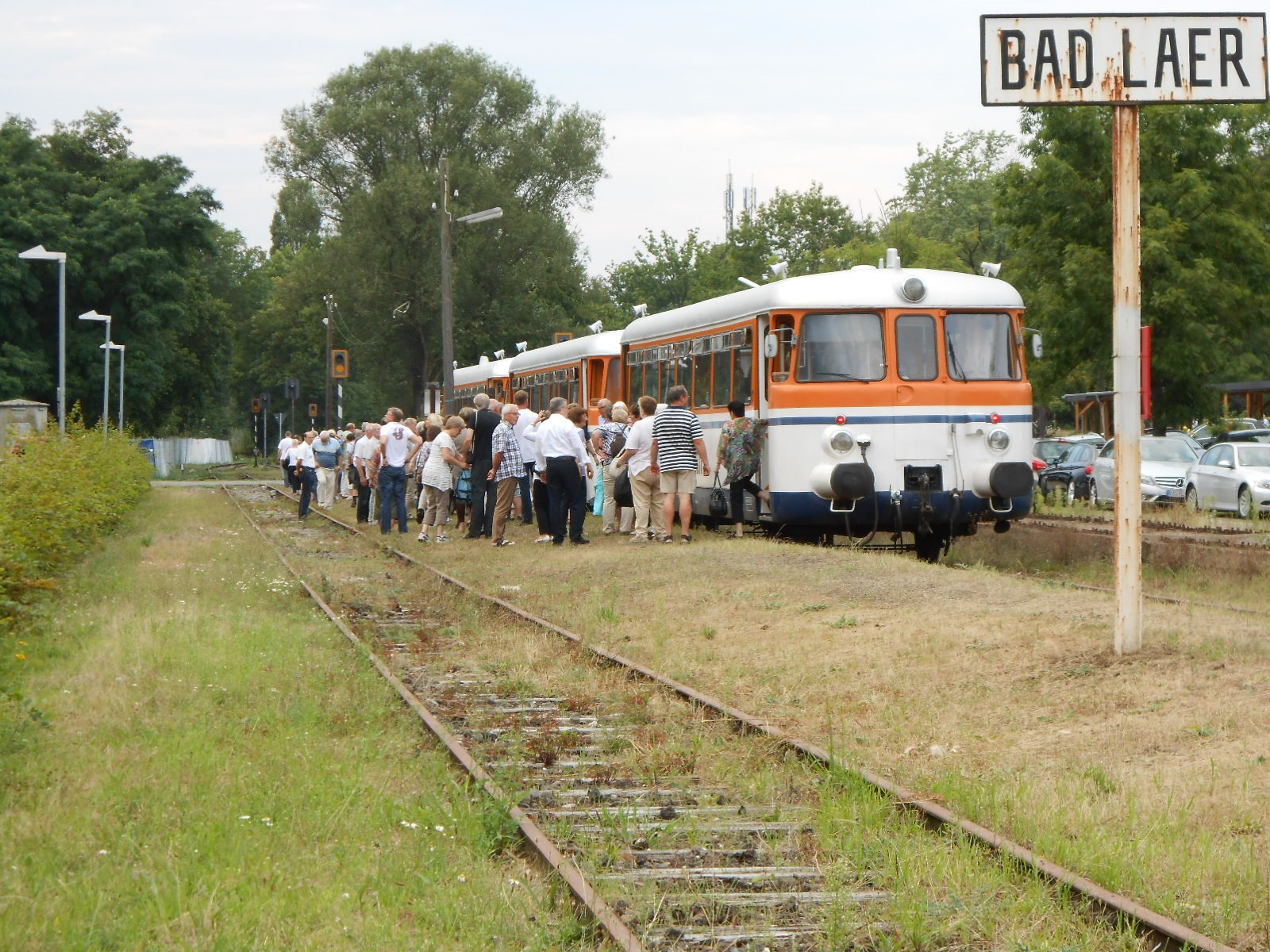 Im MAN-Schienenbus der Osningbahn reisen 160 Fahrgäste aus Bielefeld und Gütersloh über die Teutoburger Wald-Eisenbahn (TWE) nach Bad Laer zum 40. Fest der Tausend Fackeln an.